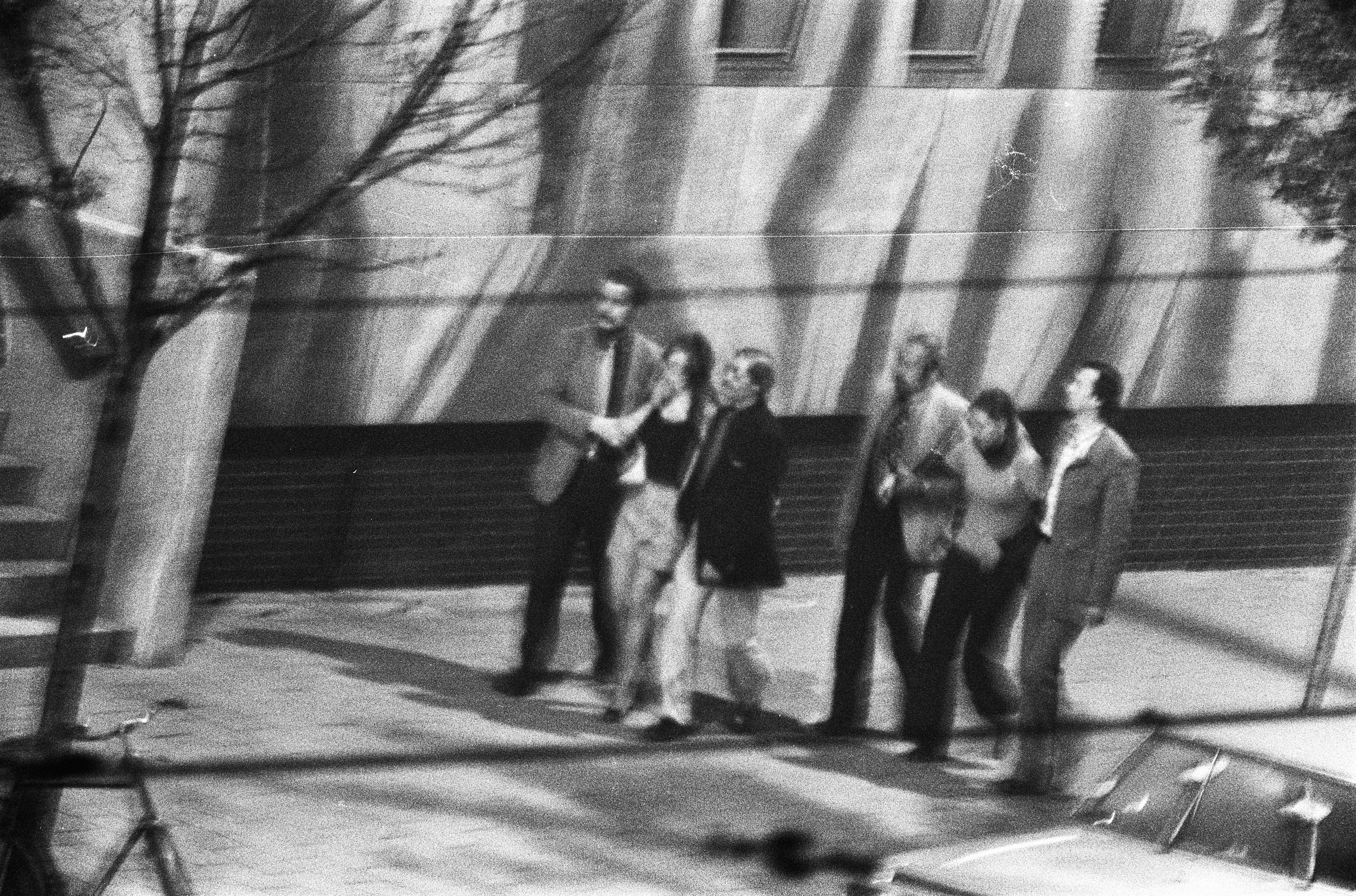 Gijzeling in Den Haag ; vrouwen worden ondersteund door rechercheurs na vrijlating